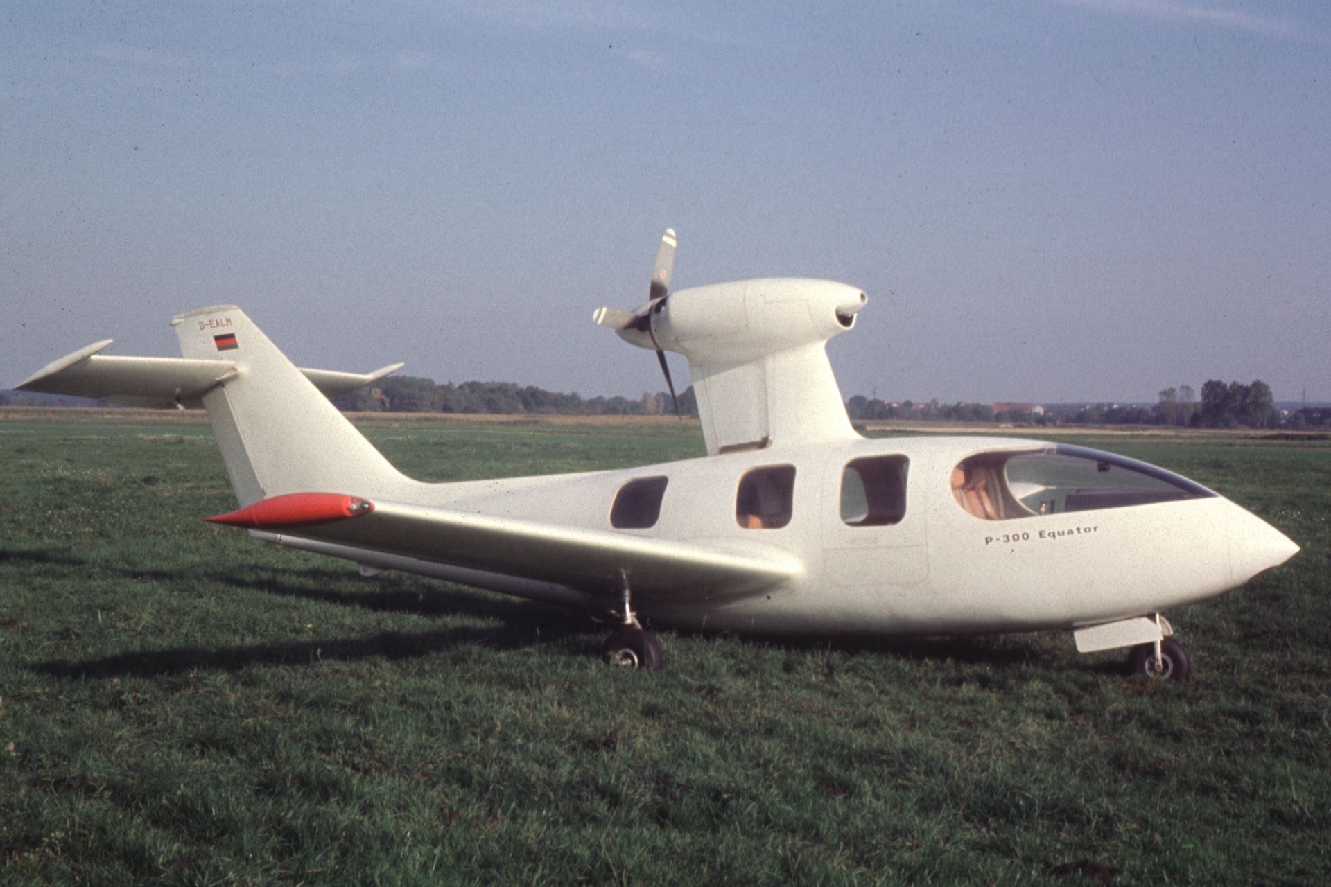 Die Pöschel P 300 Equator ist ein Amphibienflugzeug des deutschen Herstellers Pöschel Aircraft GmbH.